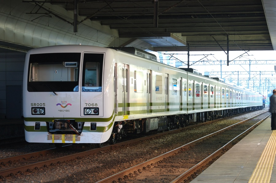 SMRT EMU SR005